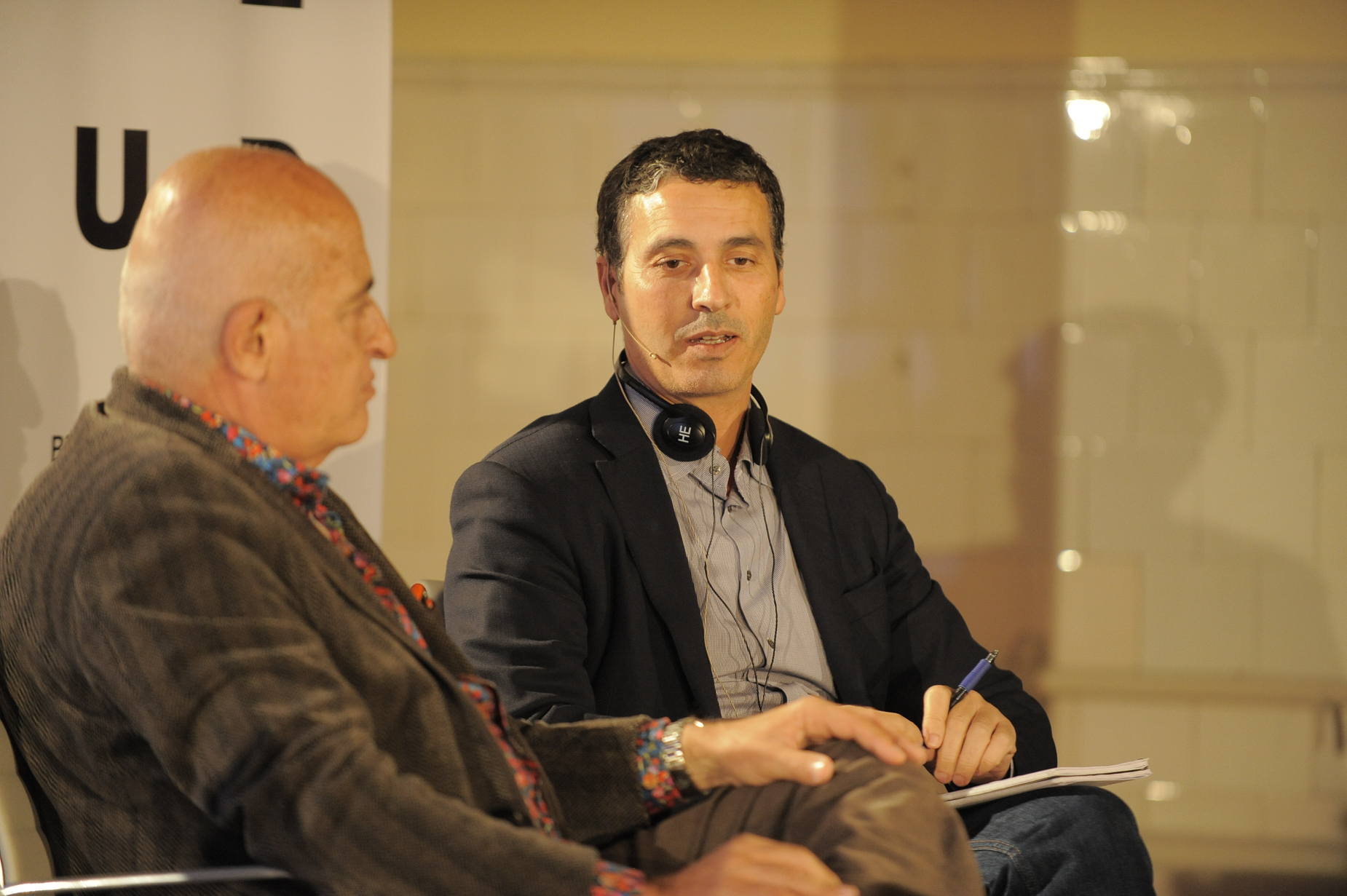 Fotografías de los invitados y participantes de la Bienal Sur 2016, realizada por la Universidad de Tres de Febrero.